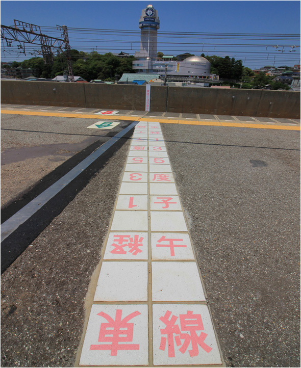 人丸前駅（明石市）ホーム子午線表示